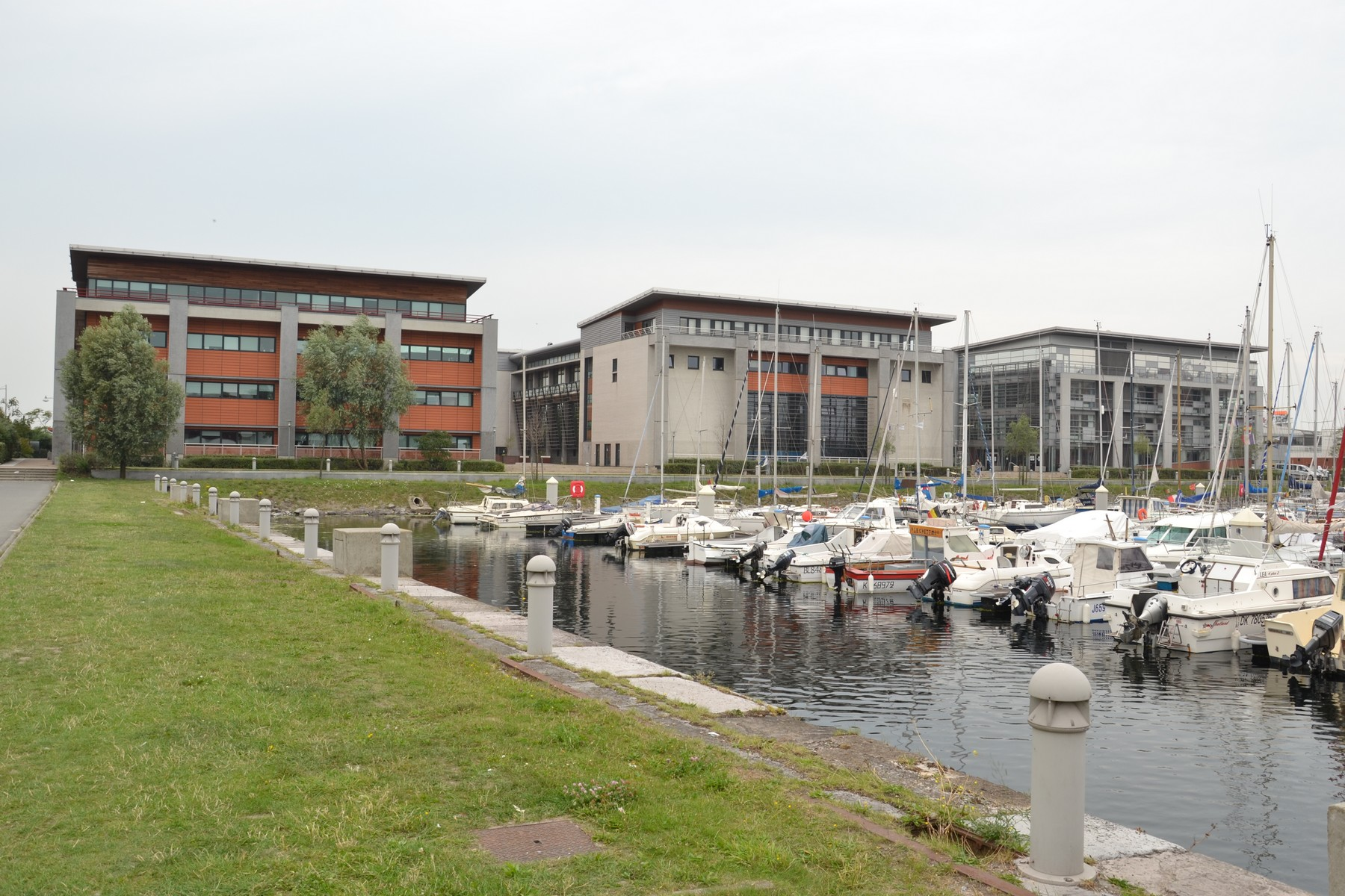 Université du Littoral Côte d'Opale - Dunkerque - Maison de la recherche (au centre). À droite, Les Darses.